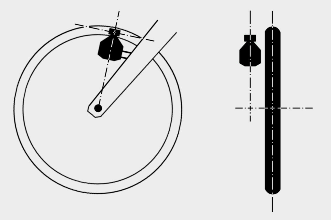 Orthogonale Verhältnisse für den Anbau eines Dynamo-Seitenläufers.